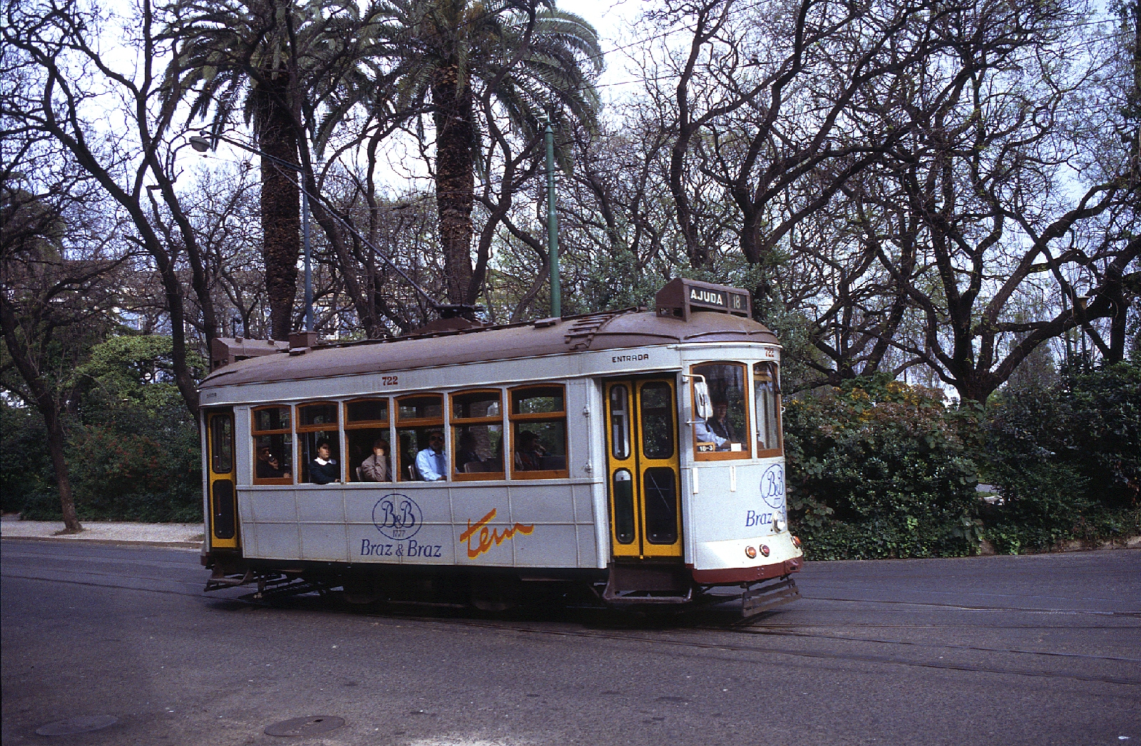 Tramvia, Lisboa